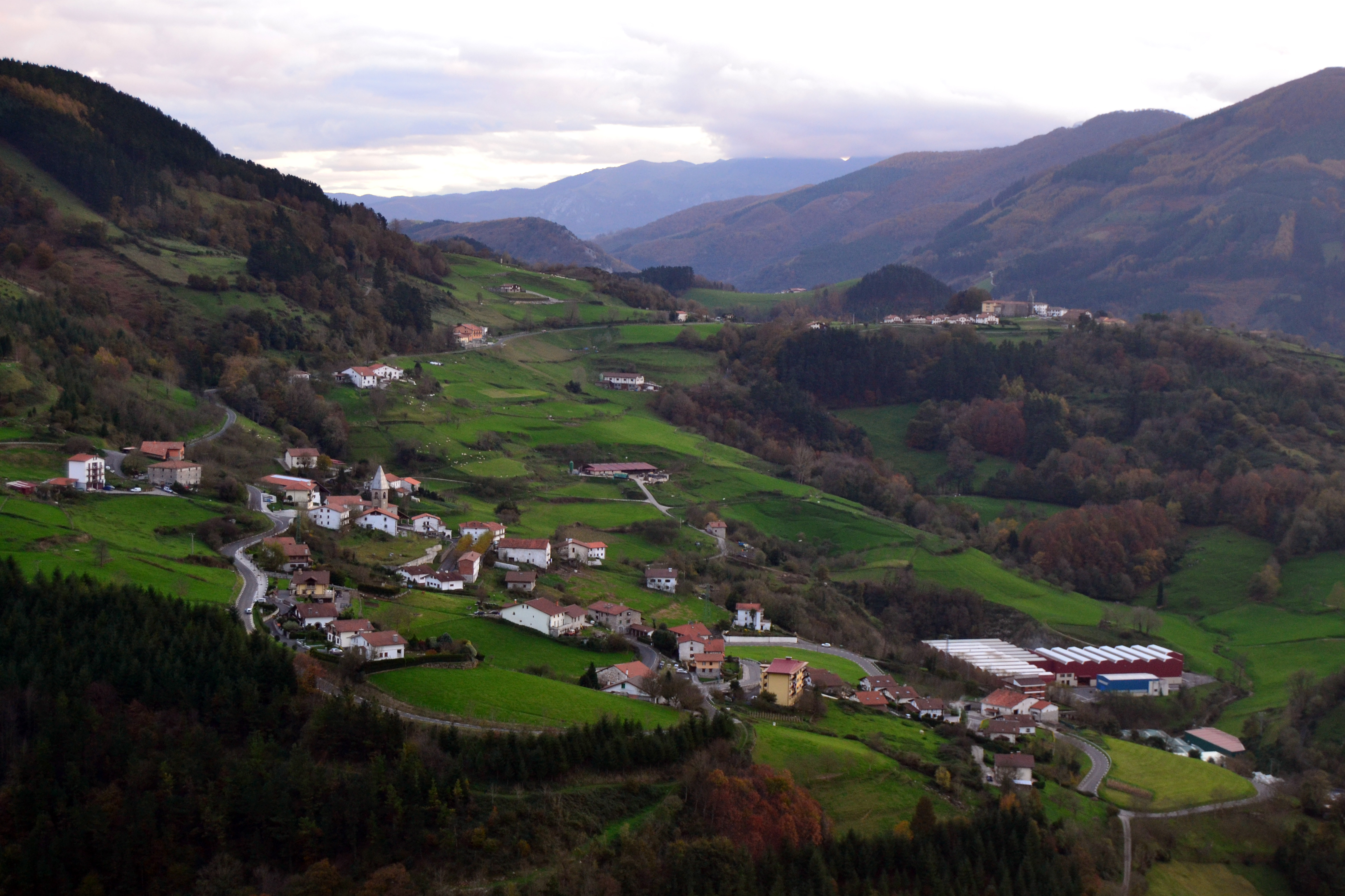 Belauntza. Gipuzkoa, Euskal Herria. Belauntza. Gipuzkoa, Basque Country.